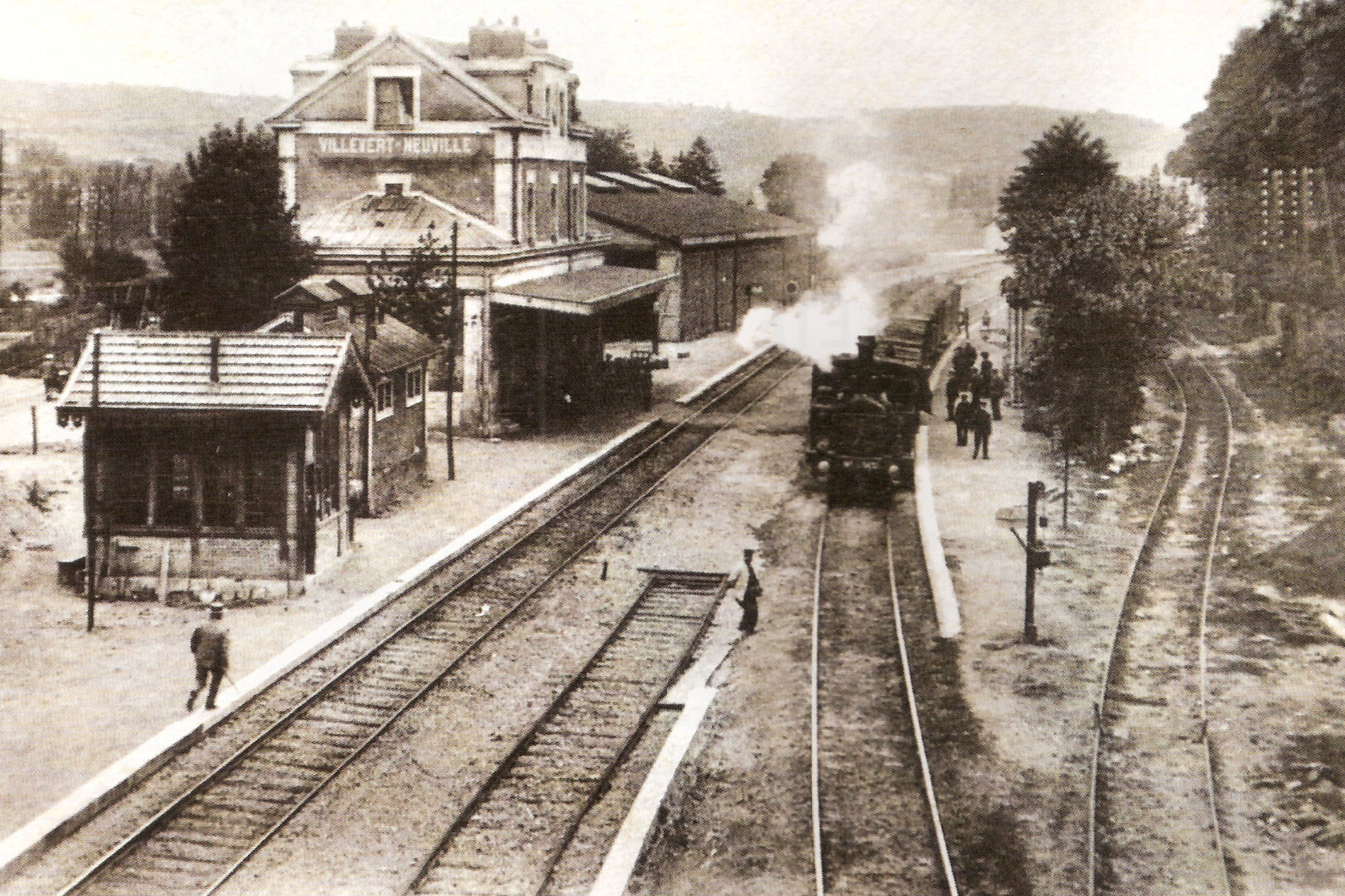 Gare de Villevert-Neuville (actuelle gare d'Albigny-Neuville), Albigny-sur-Saone, France